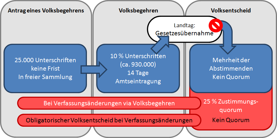 Aufbau des Prozesses der Volksgesetzgebung in Bayern